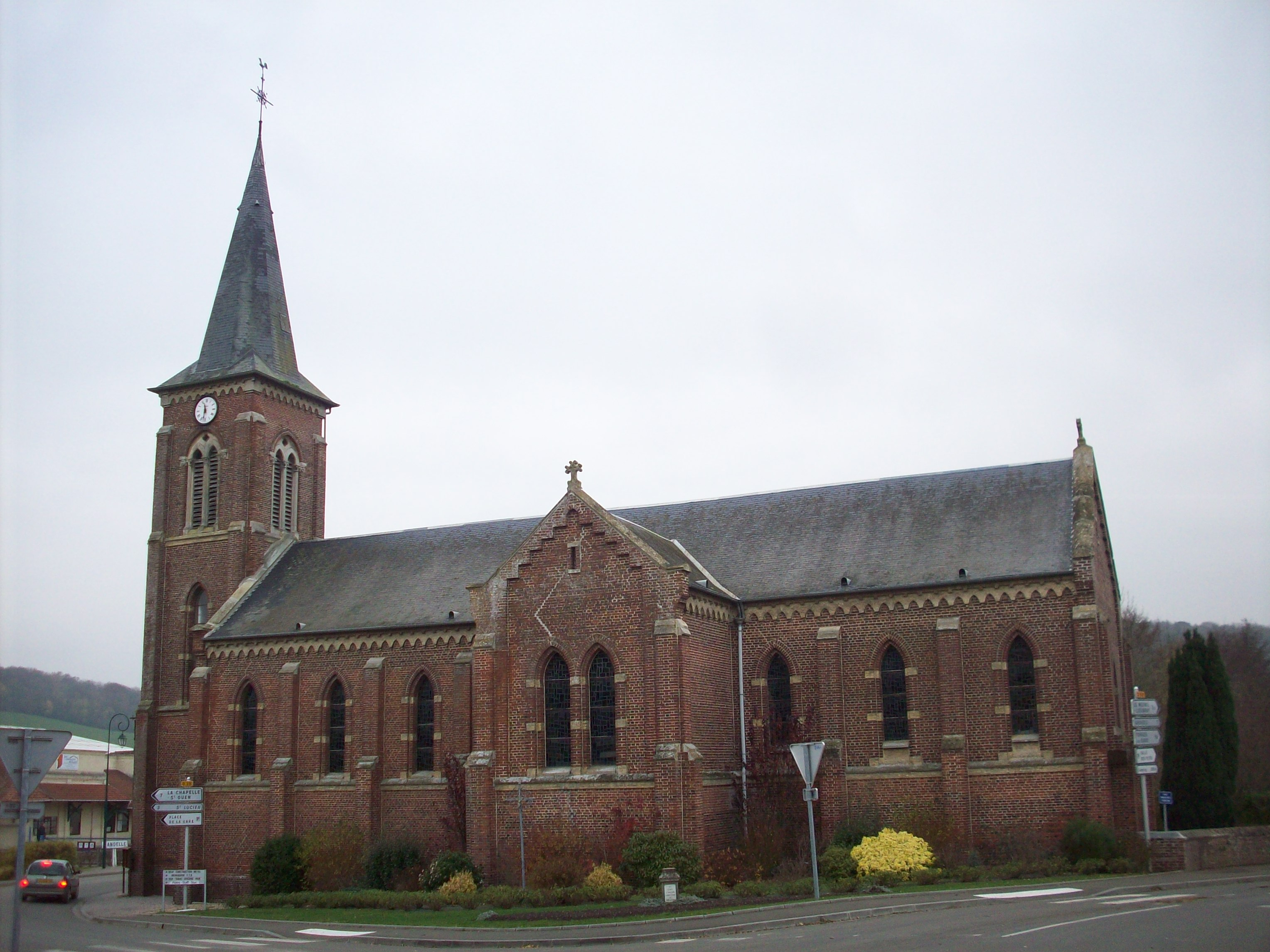 Eglise de Nolléval.